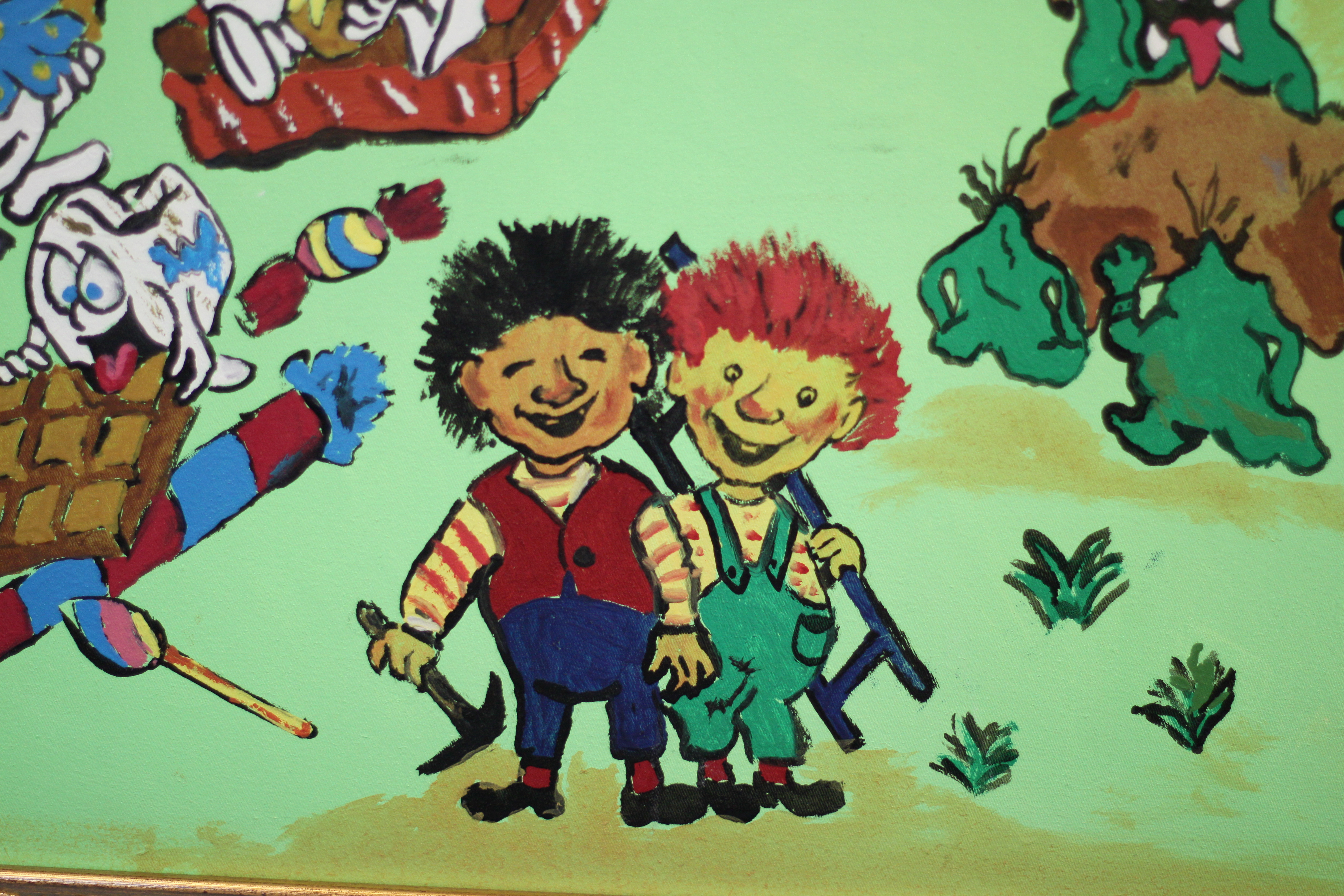 Karius und Baktus; eigene Zeichnung, Ölbild - in eigenem Besitz, die Figuren sind der Kinderbuchillustration zu Karius und Baktus nachempfunden